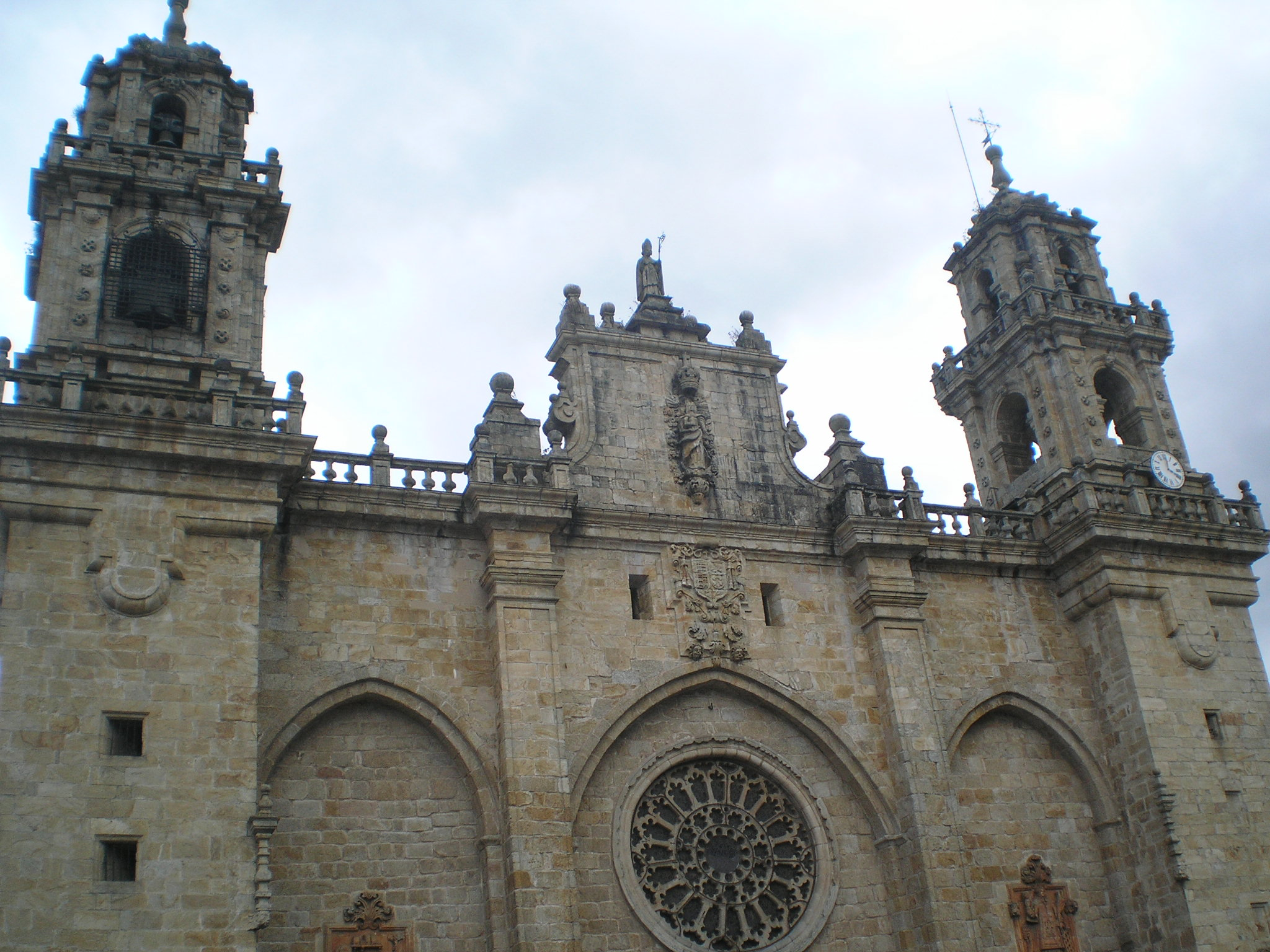 Fachada principal de la iglesia catedral de Mondoñedo (Lugo)